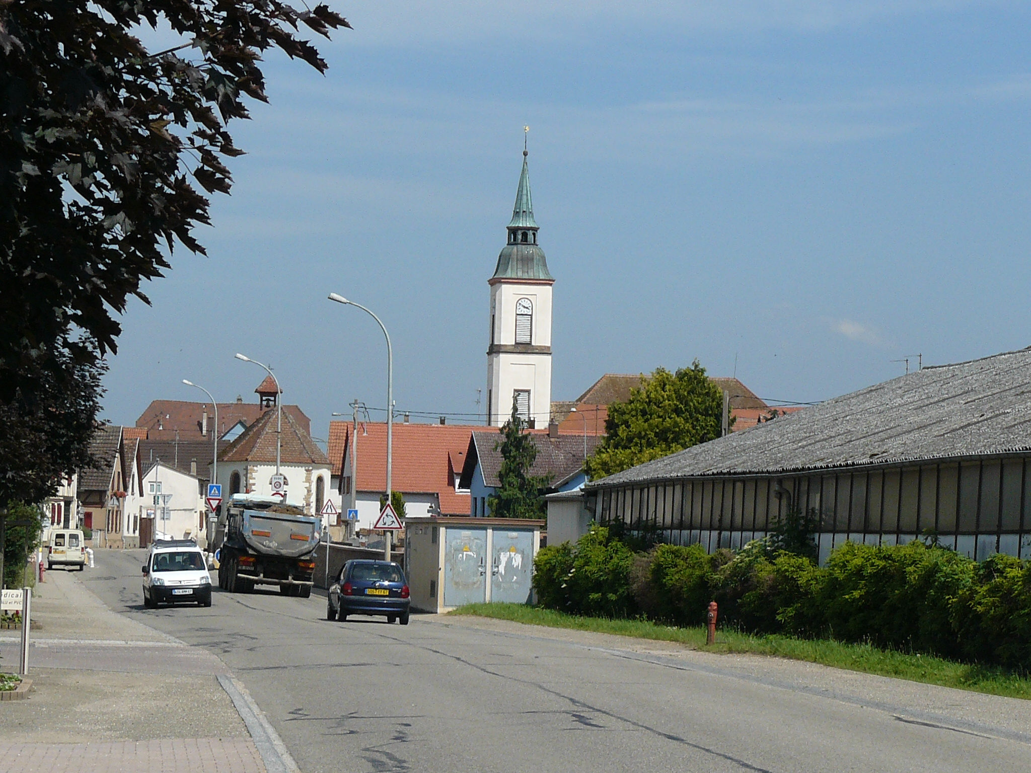 La rue principale du village Krautergersheim avec Eglise Saint Epvre